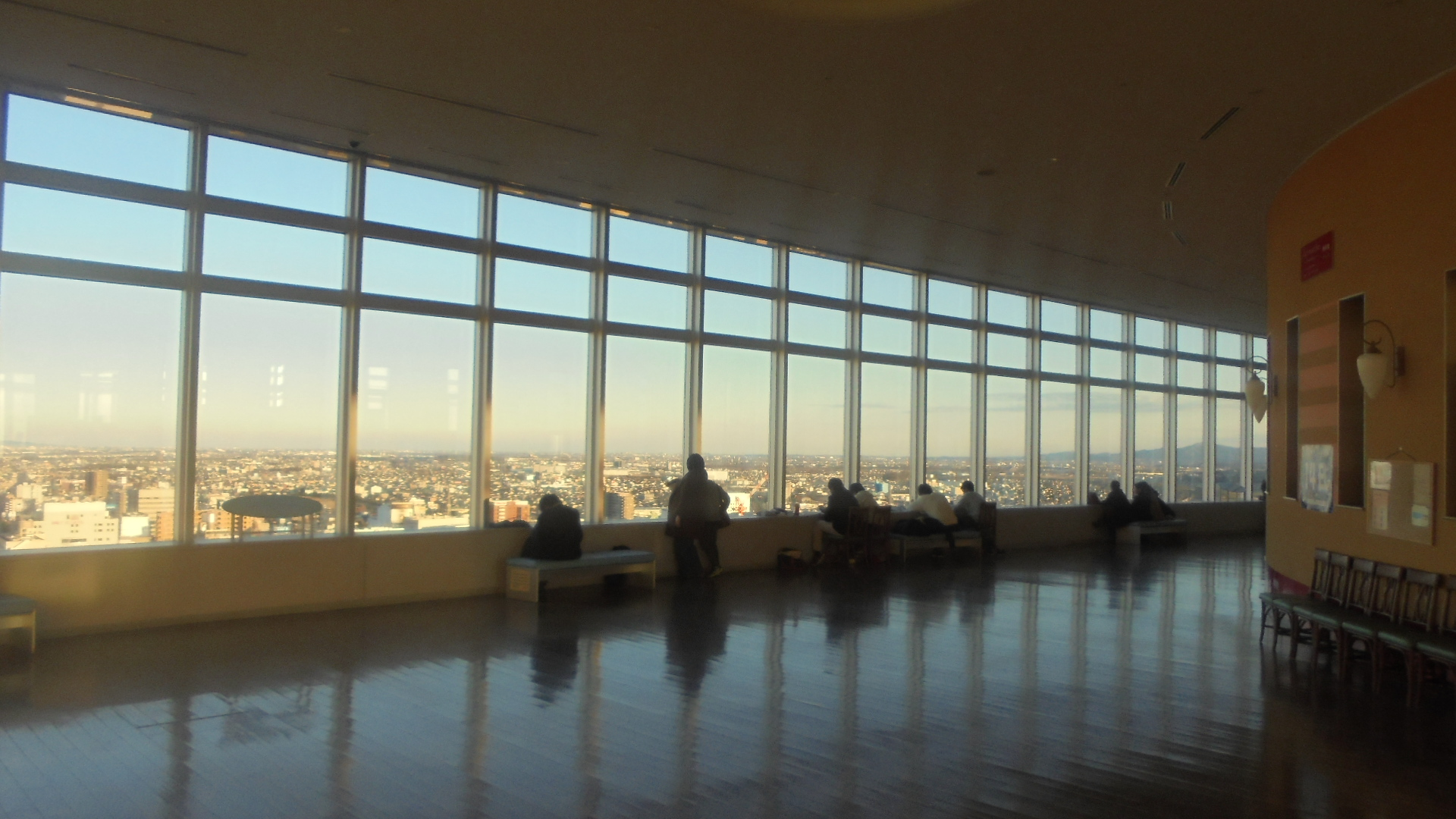 高崎市役所展望ロビー内部（東側付近で撮影）